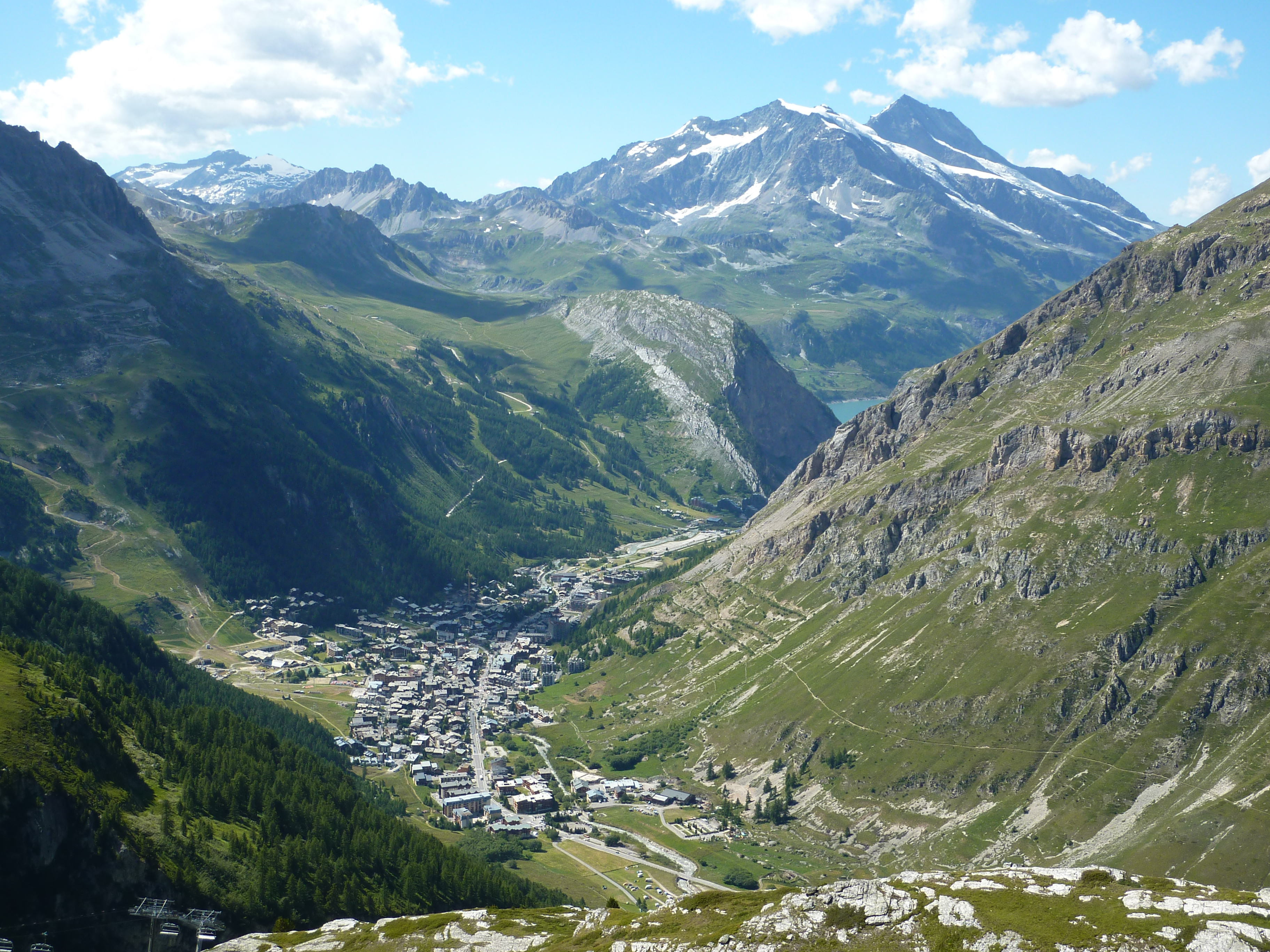 Vue d'ensemble de Val d'Isère (73 - FRANCE) avec au fond le lac de Chevril et le mont Pourri (3779 m). Photographie du 31/07/2012 prise dans la descente nord du col de l'Iseran.